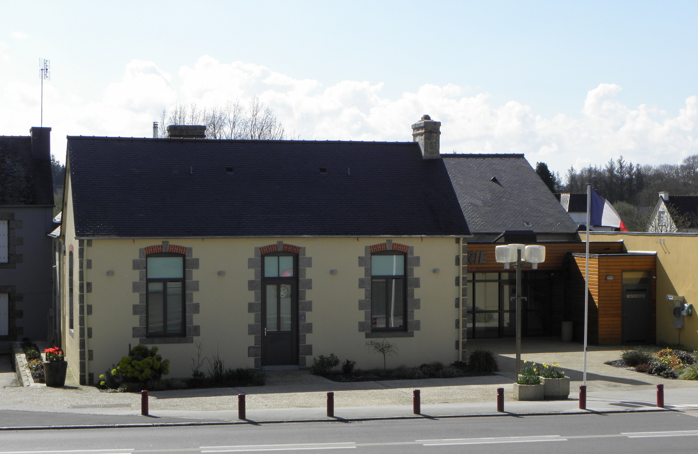 Mairie de Plounévez-Quintin (22).